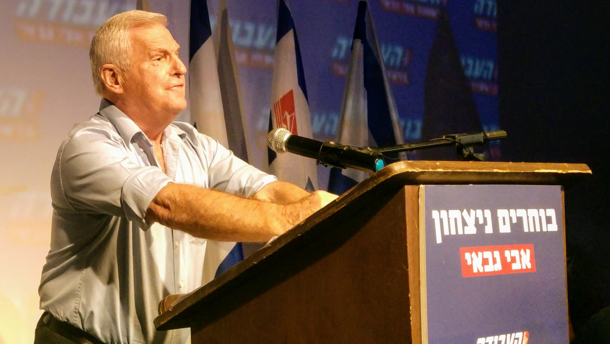 אלוף במיל' עמירם לוין במסיבת הניצחון של אבי גבאי דרום תל אביב 27/07/2017